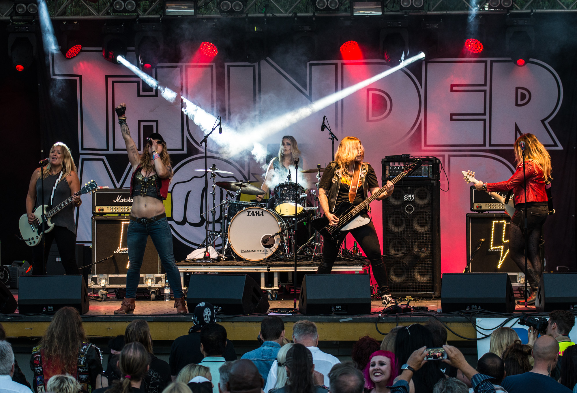 Thundermother i Kungsträdgården i Stockholm under Putte i Parken 2017.